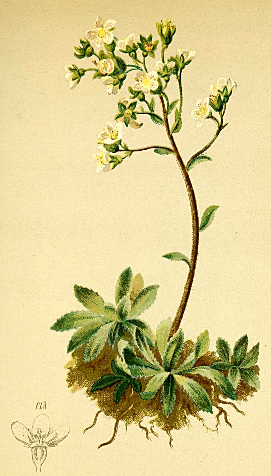 Saxifraga paniculata subsp. brevifolia